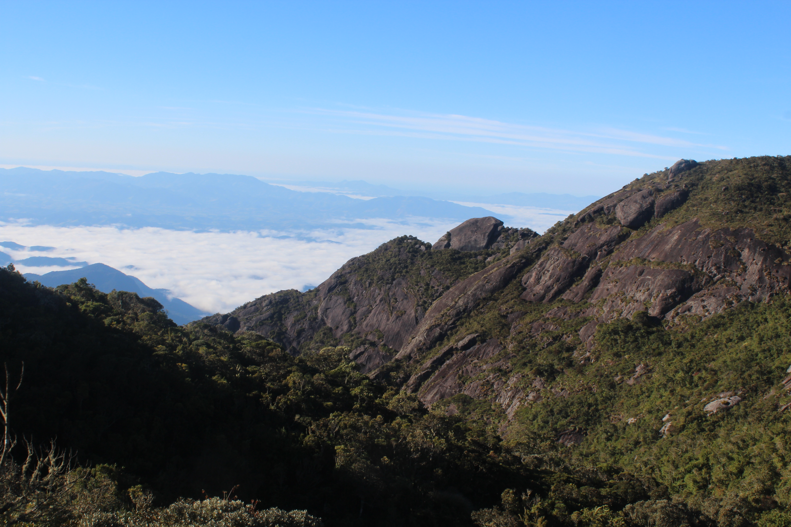 Visto da trilha da Pedra do Sino, no Parque Nacional Serra dos Órgãos.